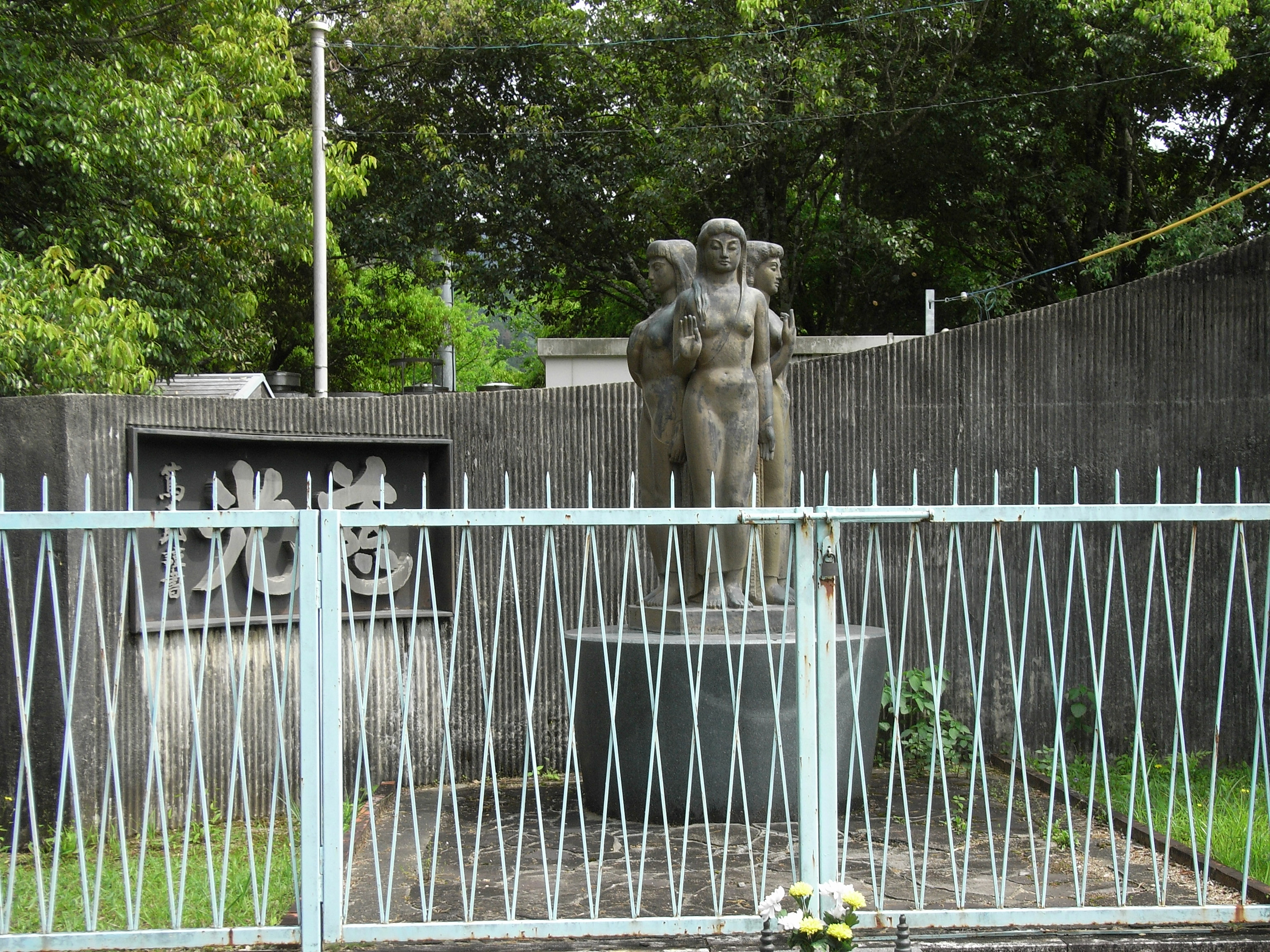 Lake